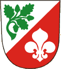 Znak městysu Buchlovice